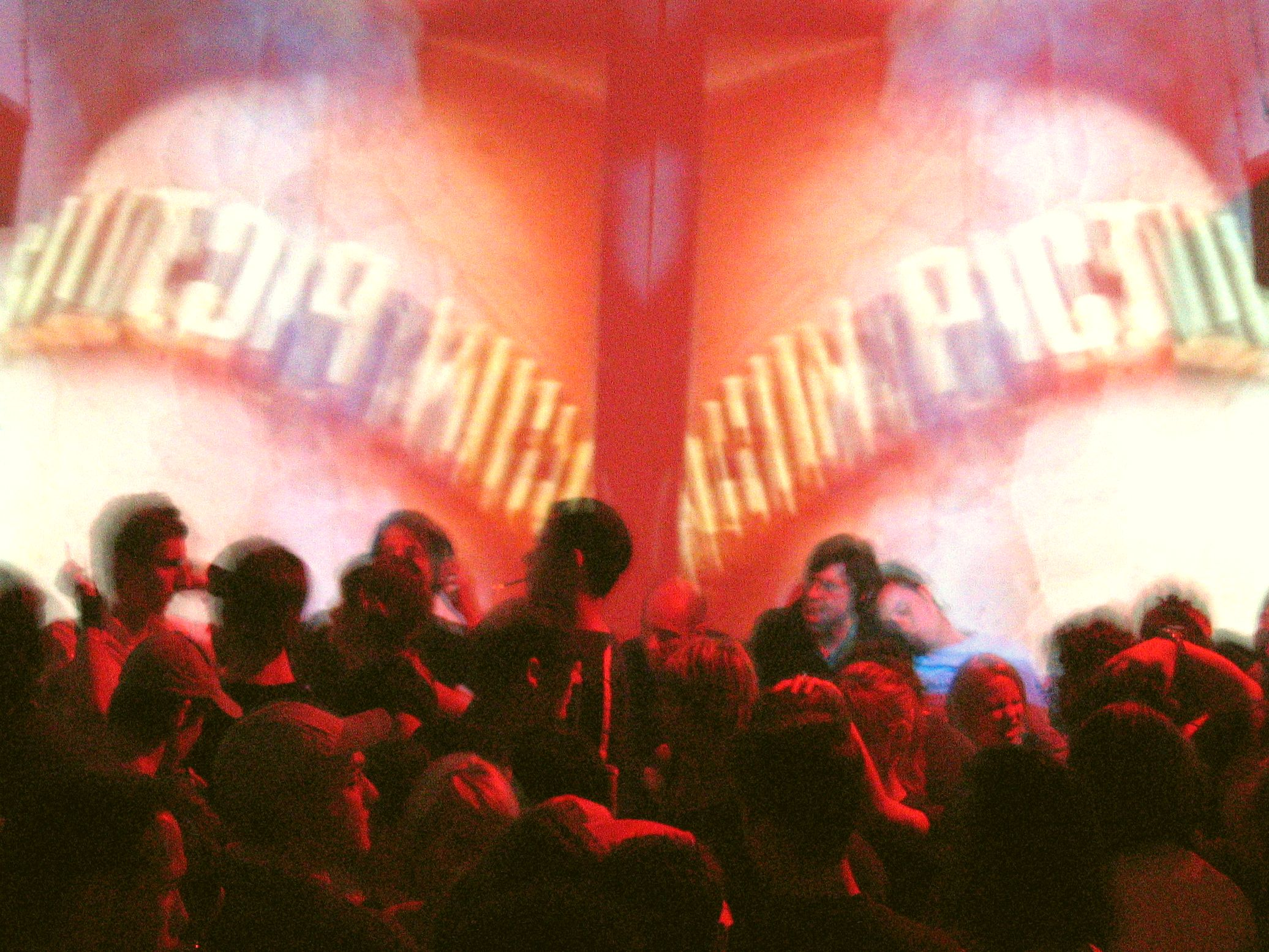 Visuals im Harry Klein Club, München